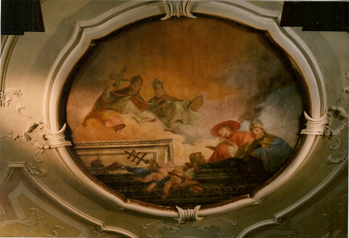 Les Pères de l'Eglise occidentale